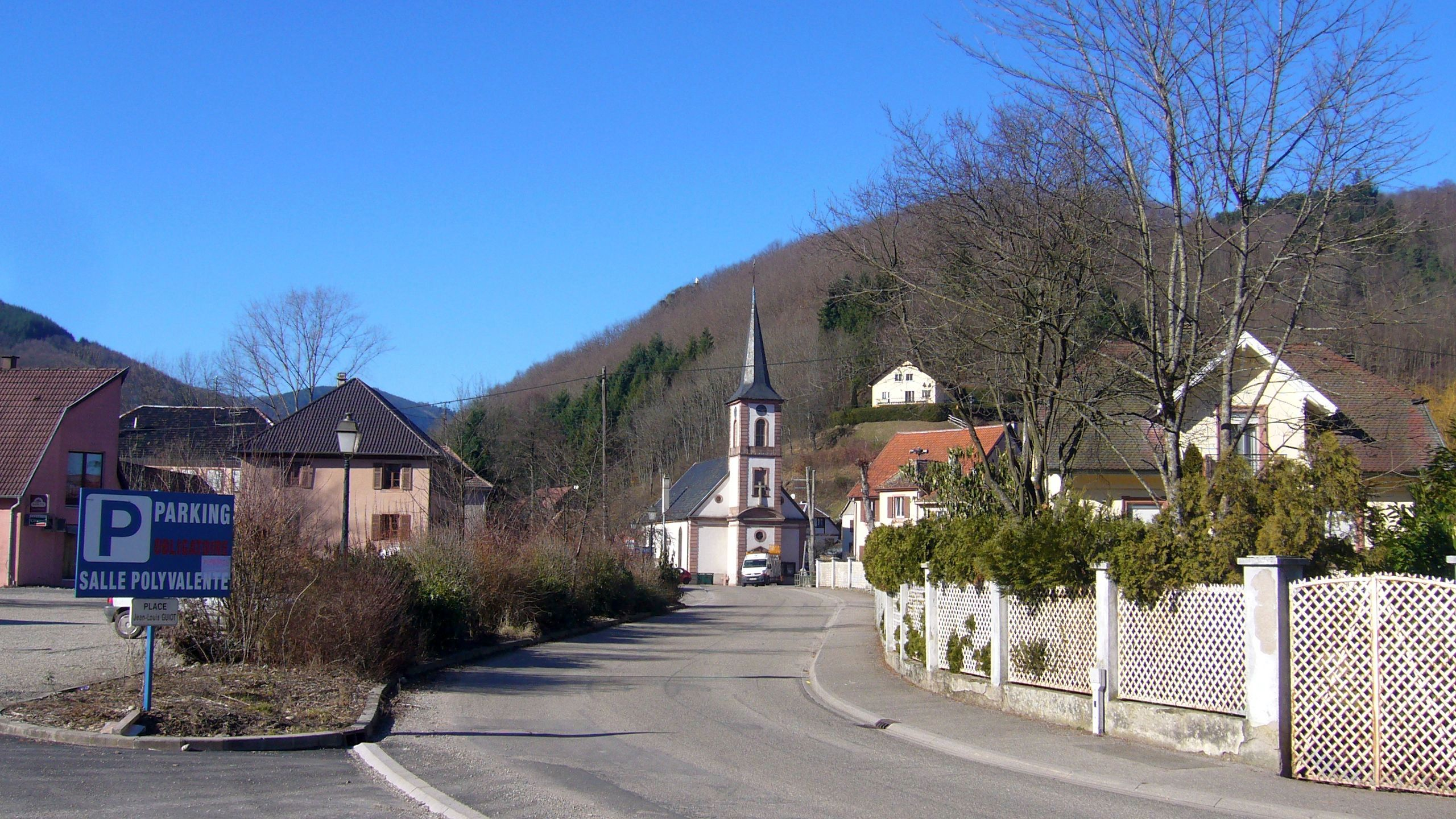 Eglise Saint-Maurice